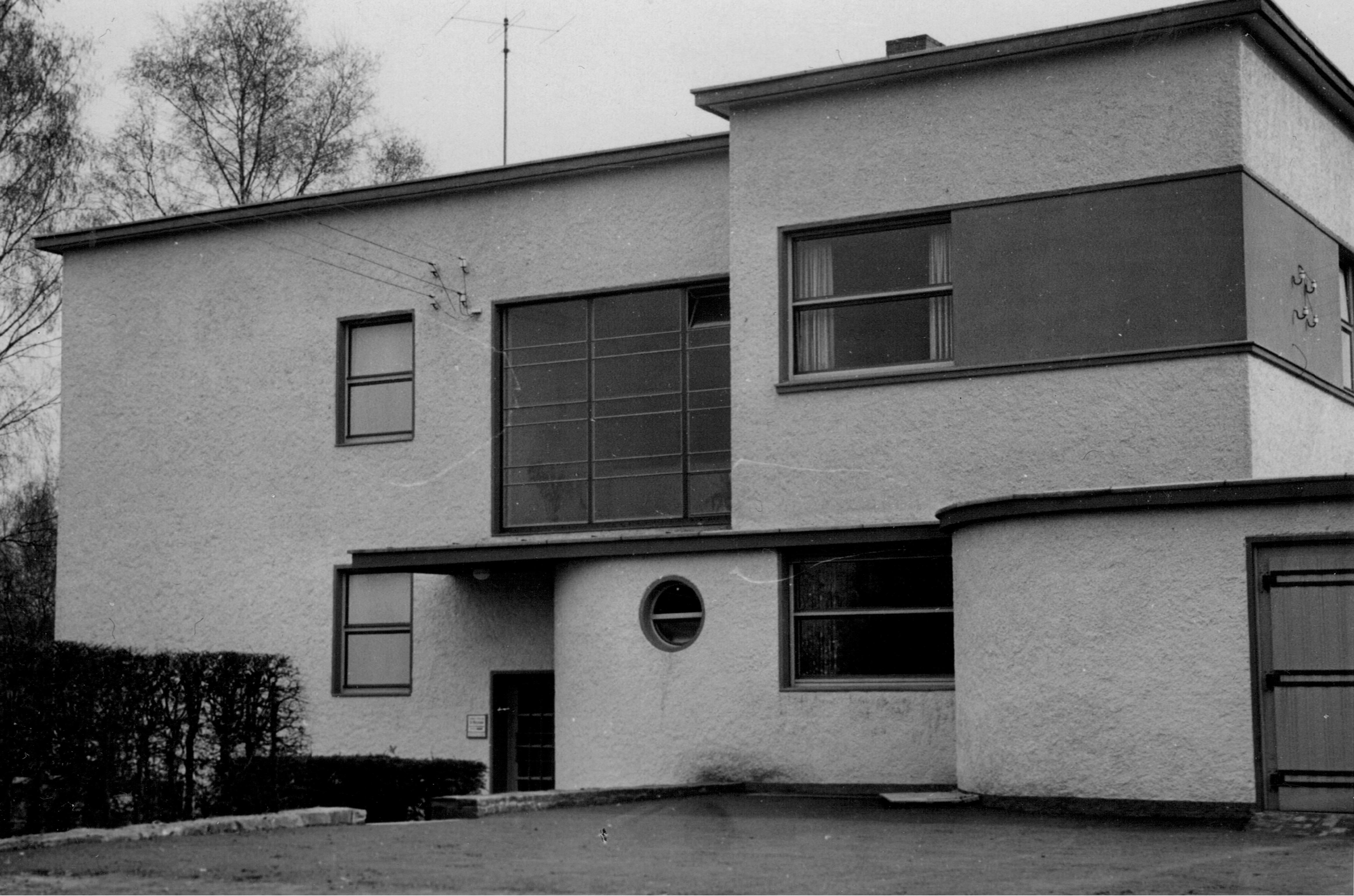 Lemgo, Slavertorwall 15, Wohnhaus mit Arztpraxis, Architekt Ernst Pethig, erbaut 1929-1931, Foto: etwa 1950